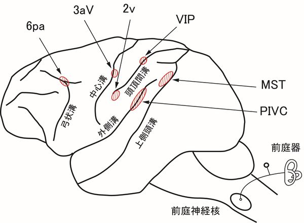 from 平衡感-脳科学辞典, CC Attribution-NoDerivatives 4.0 International